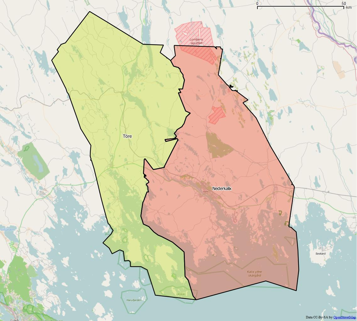 Distriktsindelningen i Kalix kommun World file: 181.74195196950773834 0 0 -181.74195196950773834 2456875.16261618910357356 9949044.04573539830744267